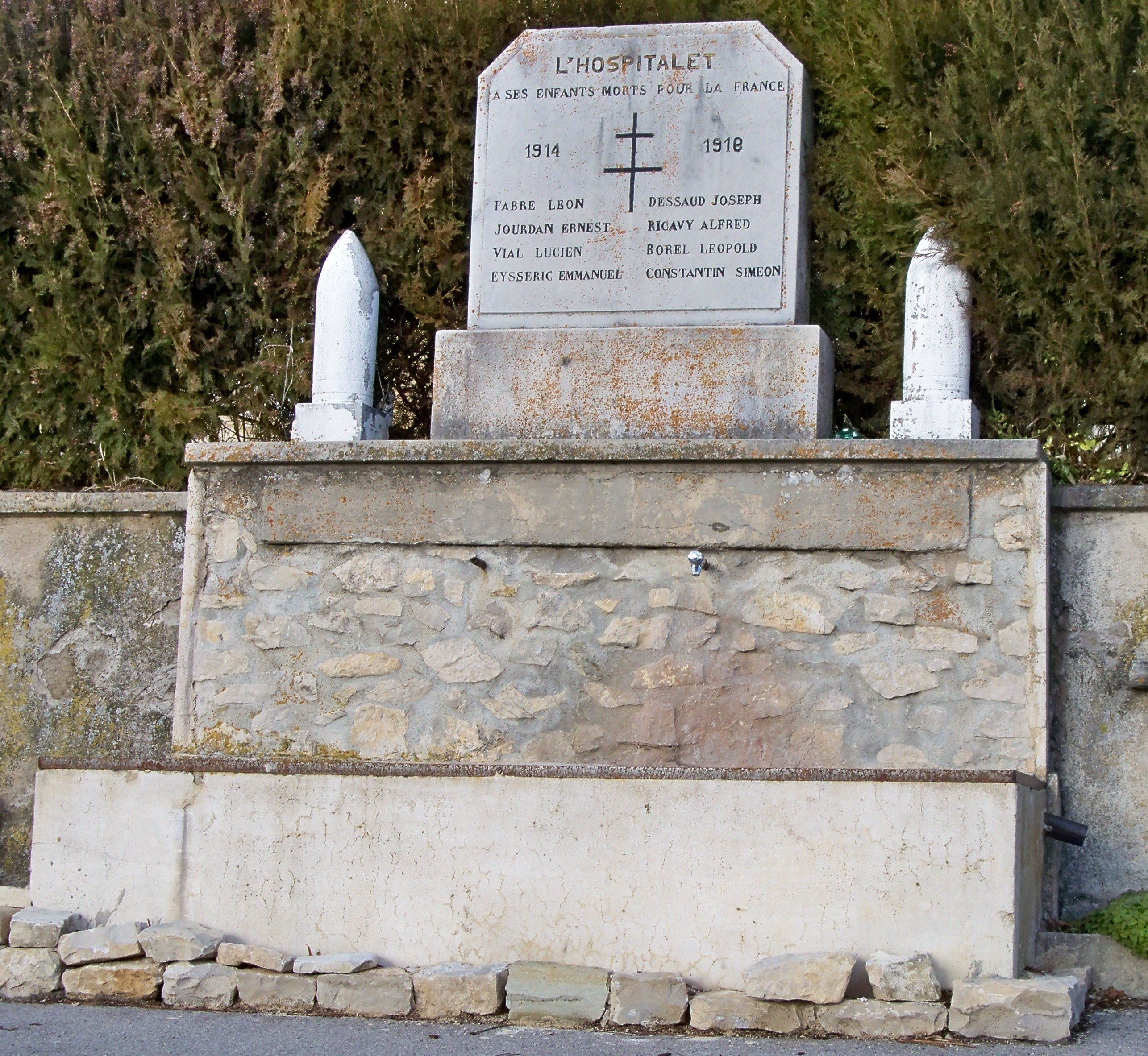 Monument aux morts de l'Hospitalet (04), France